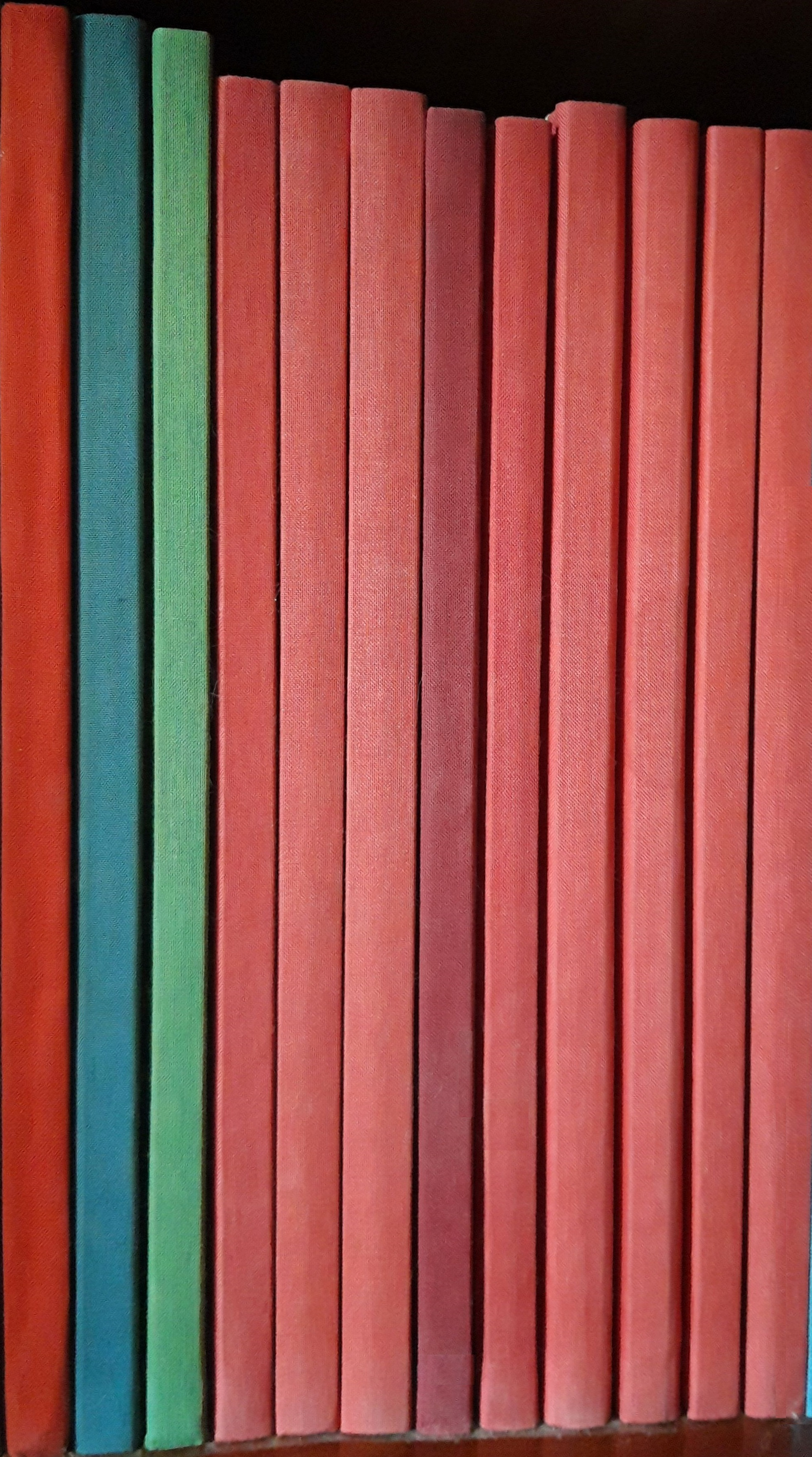 Quick et Flupke (1) et Tintin et Milou (11) en noir et blanc.